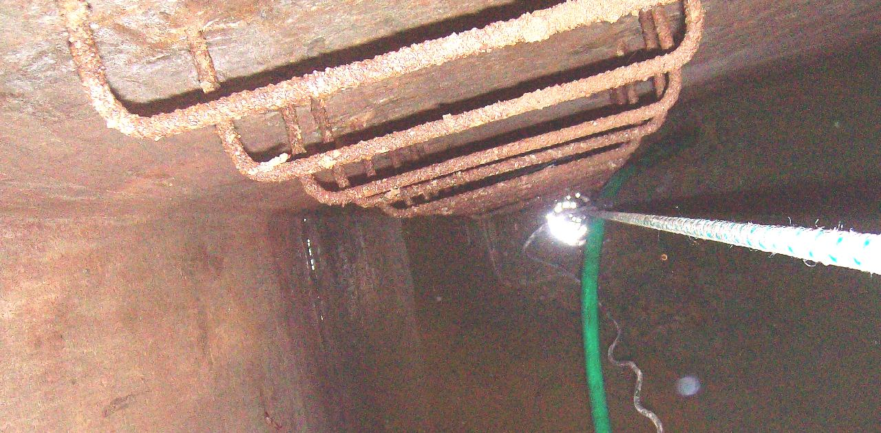 Accesso cisterna interrata